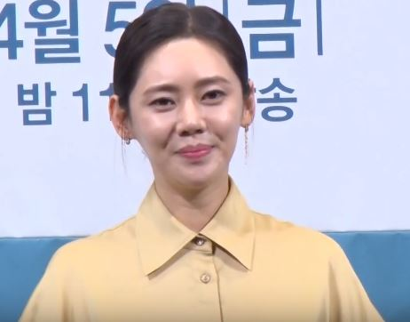 JTBC 새 금토드라마 '아름다운 세상' 제작발표회가 4일 서울 강남구에 위치한 임피리얼팰리스 호텔에서 열렸다.